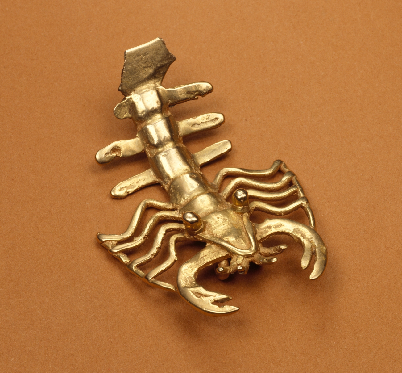 Chiriqui; Pendant; Metal-Ornaments